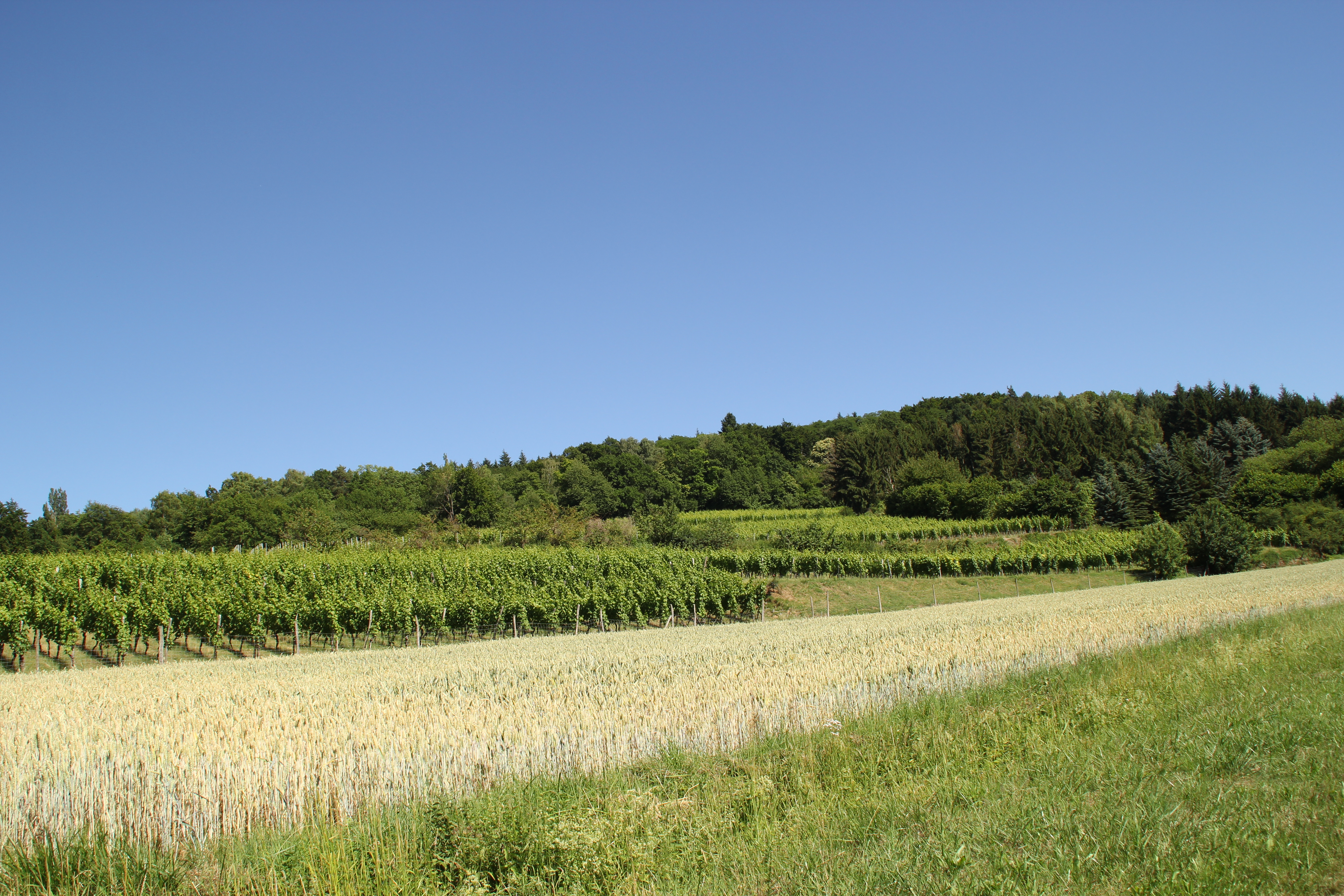 Der Weinberg Steinberg am Heidkopf bei Alzenau-Michelbach in Bayern